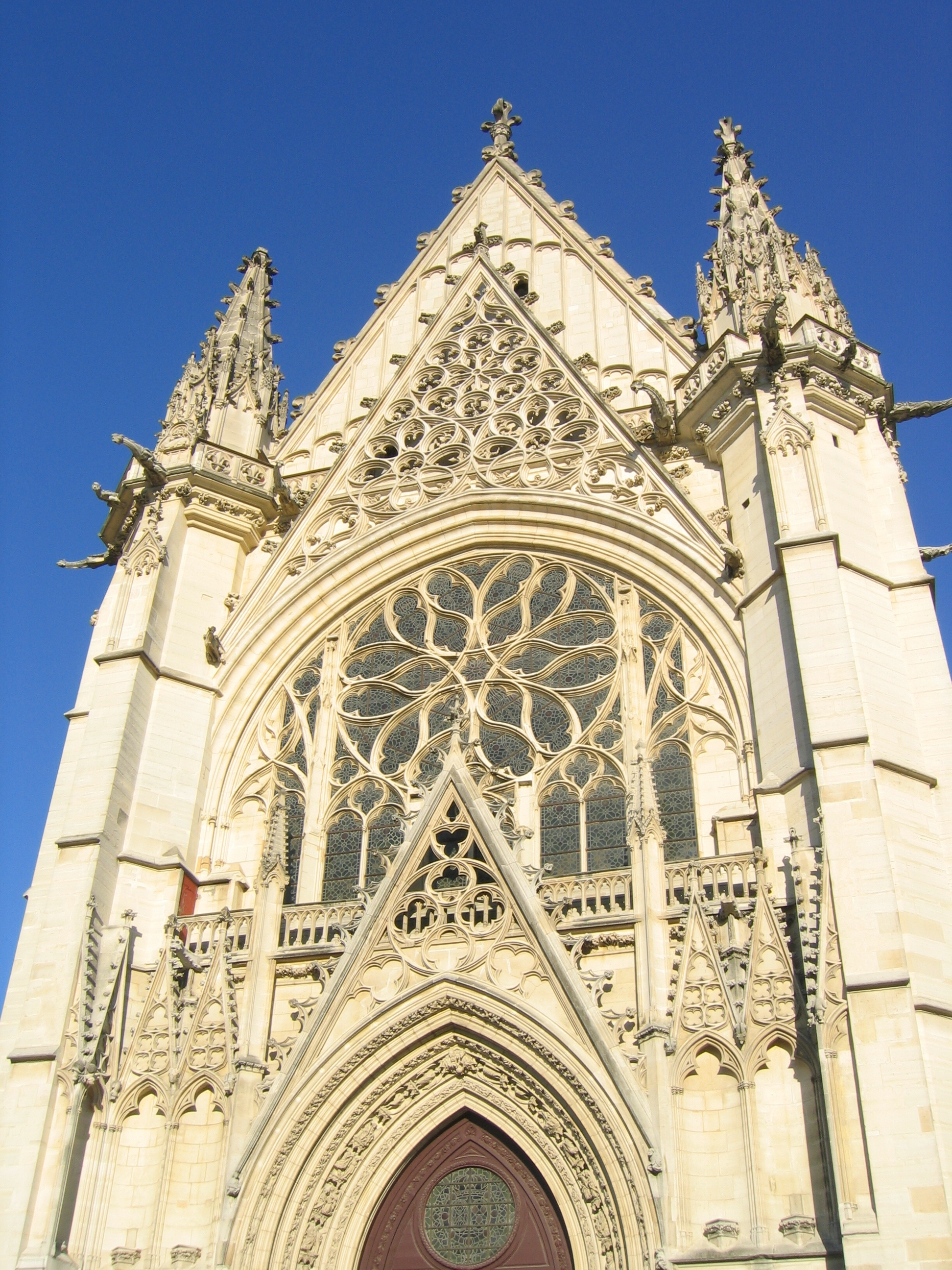 Paris, Sainte Chapelle du Chateau de Vincennes, ancienne demeure royale Vers le Bois de Vincennes en France angle 3